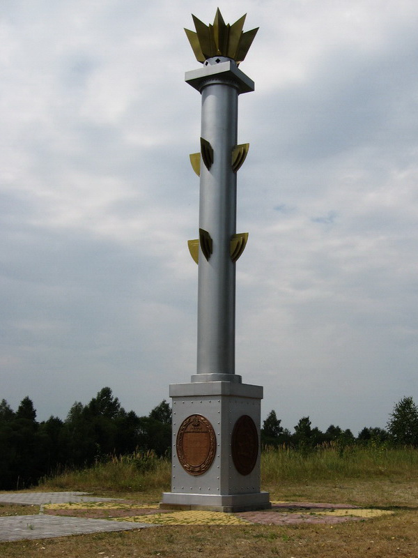 Селішча. Дняпроўска-Бугскі канал. Водападзел басейнаў рэк Дняпра і Віслы. Памятны знак устаноўлены ў 2009 годзе. Рэспубліканскім унітарным эксплуатацыйна-будаўнічым прадпрыемствам "Днепа-Бугскі водны шлях" у гонар старажытнага беларускага воднага шляху, які стагоддзямі злучае народы Усходу і Захаду